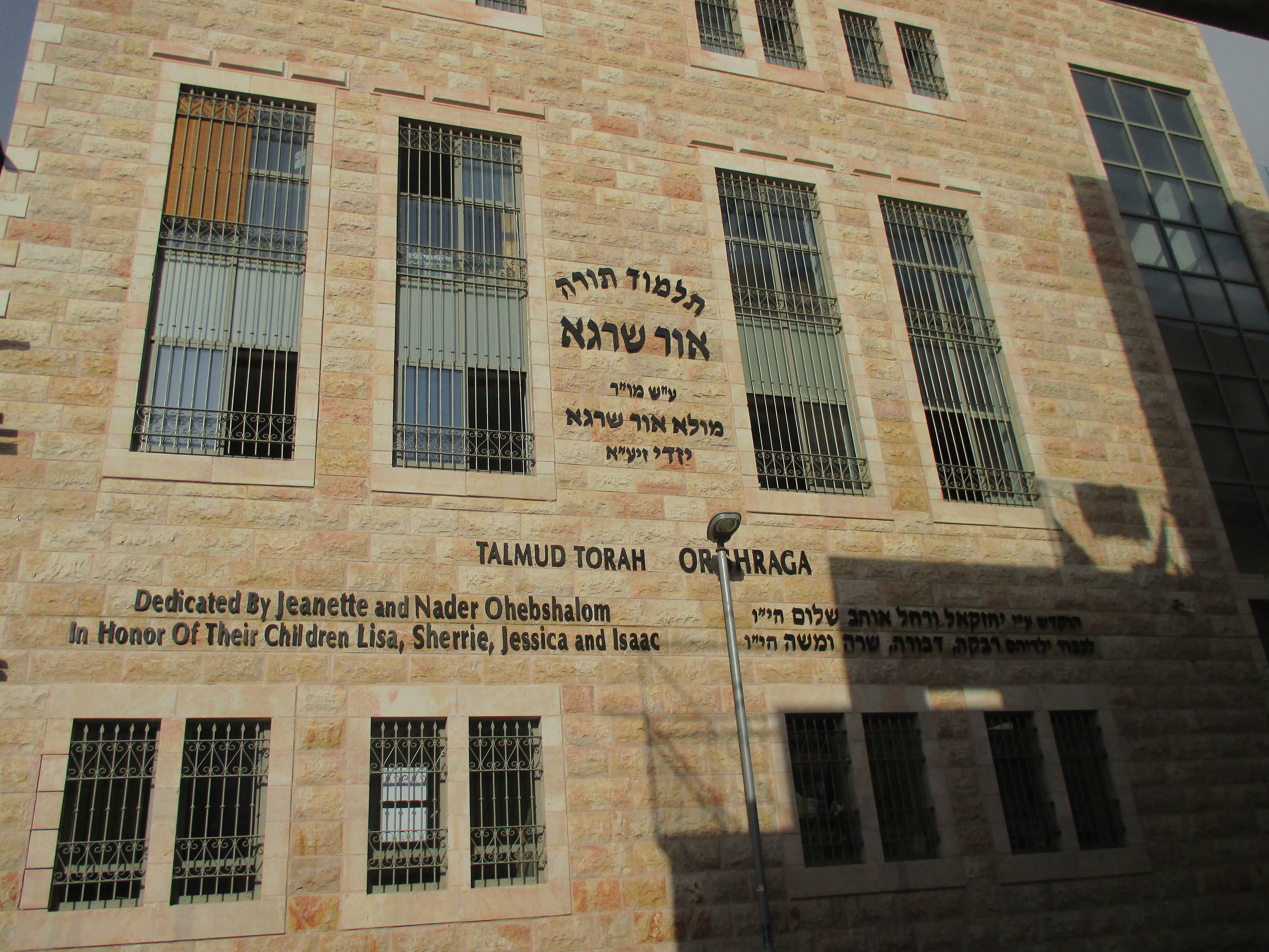 תלמוד תורה אור שרגא בירושלים